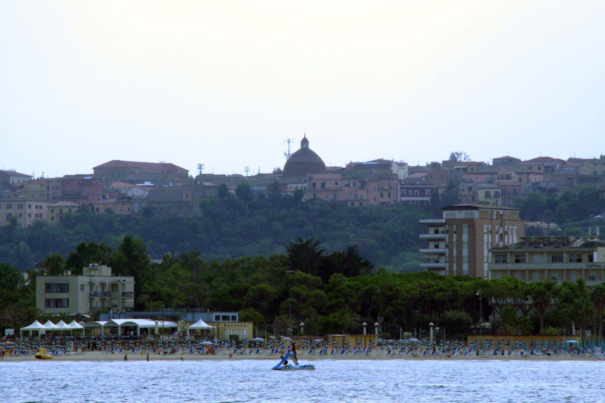 Giulianova vista dal mare